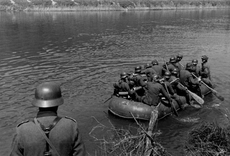 Heeresfilmstelle, Bildarchiv Maas-Übergang bei Aiglemont. Übersetzen im Floss-Sack. Aufnahme am: 14.5.1940 Ort: bei Aiglemont, 3 km ostw. Charleville Land: Frankreich